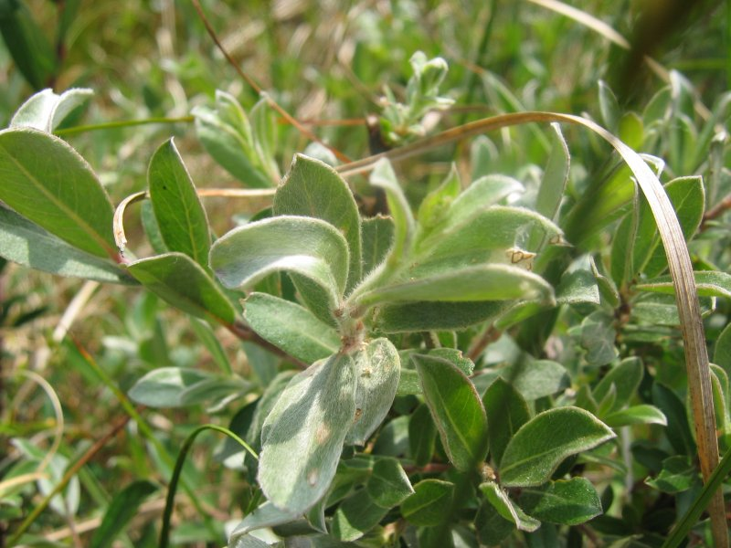 Dünen-Kriech-Weide Salix repens subsp. dunensis, Zingst